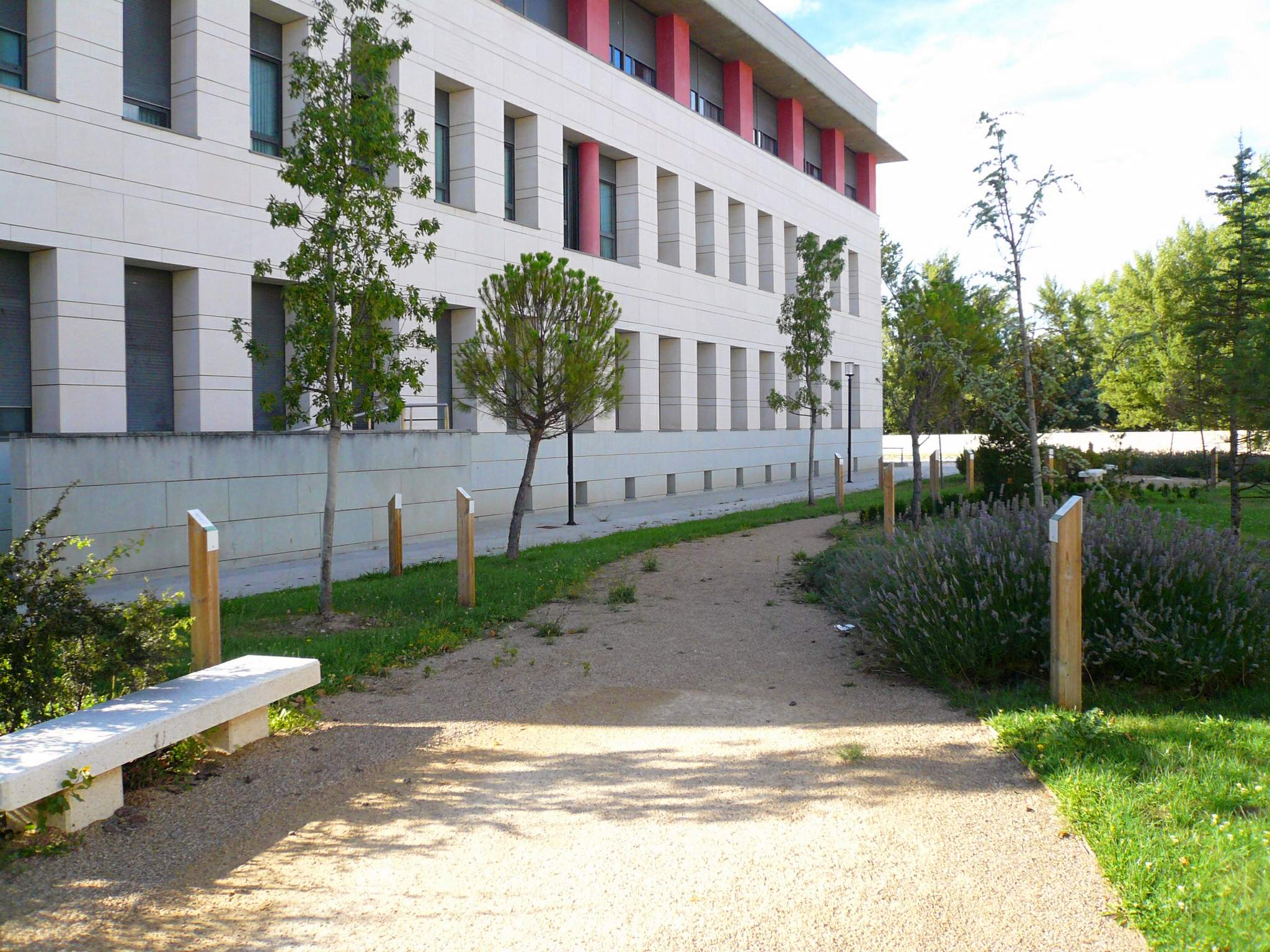 Los Árboles de la Sabiduría, jardín académico en el Campus de San Amaro de la Universidad de Burgos (UBU)